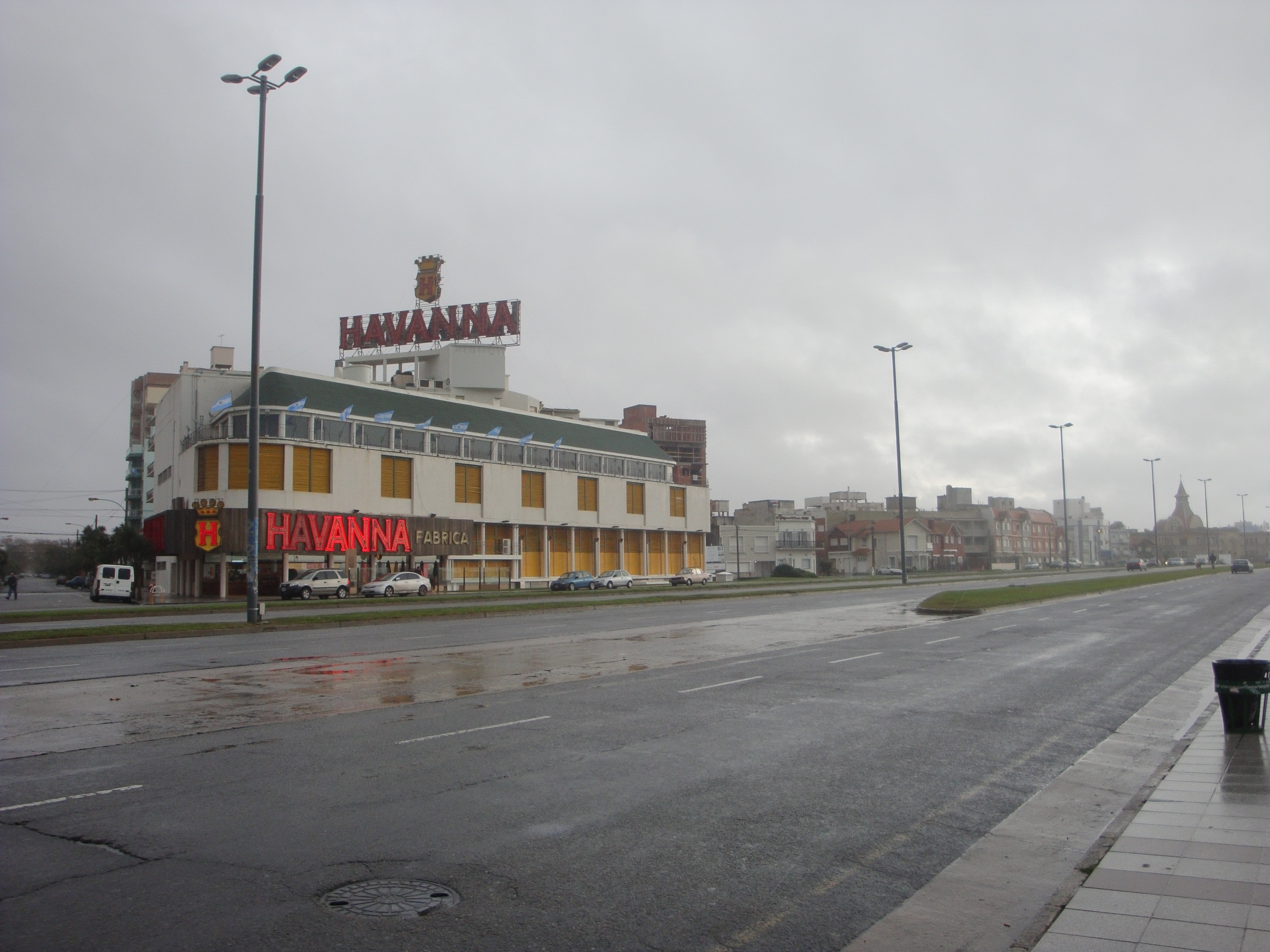 Avenida Peralta Ramos, Mar del Plata. Se puede ver la casa central de Havanna y en el fondo el Instituto Saturnino Unzué